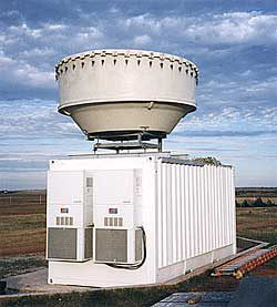 Großansicht eines MMCR